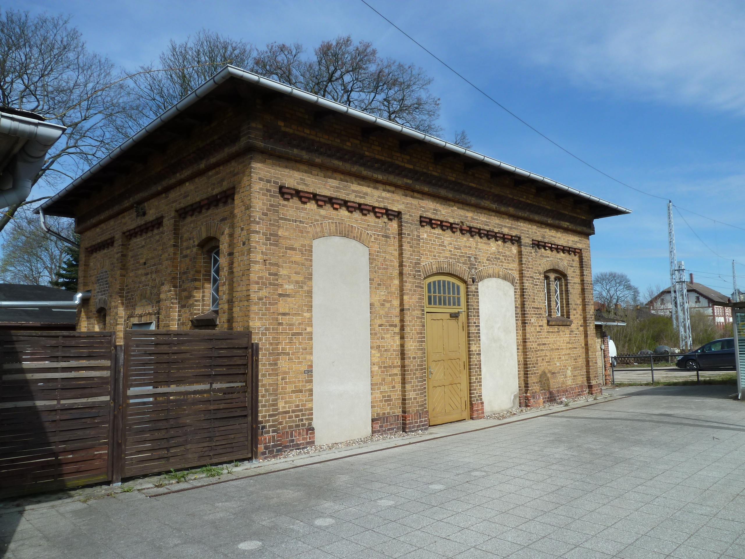 Ehemaliger Bedürfnisanstalt des Hauptbahnhofs in Neustrelitz, denkmalgeschützt.